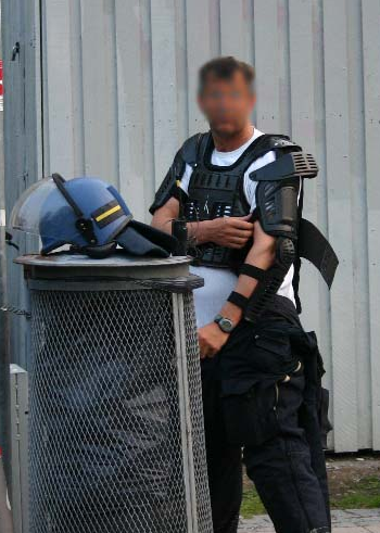 Politibetjent fra Københavns politi med beskyttende brynje